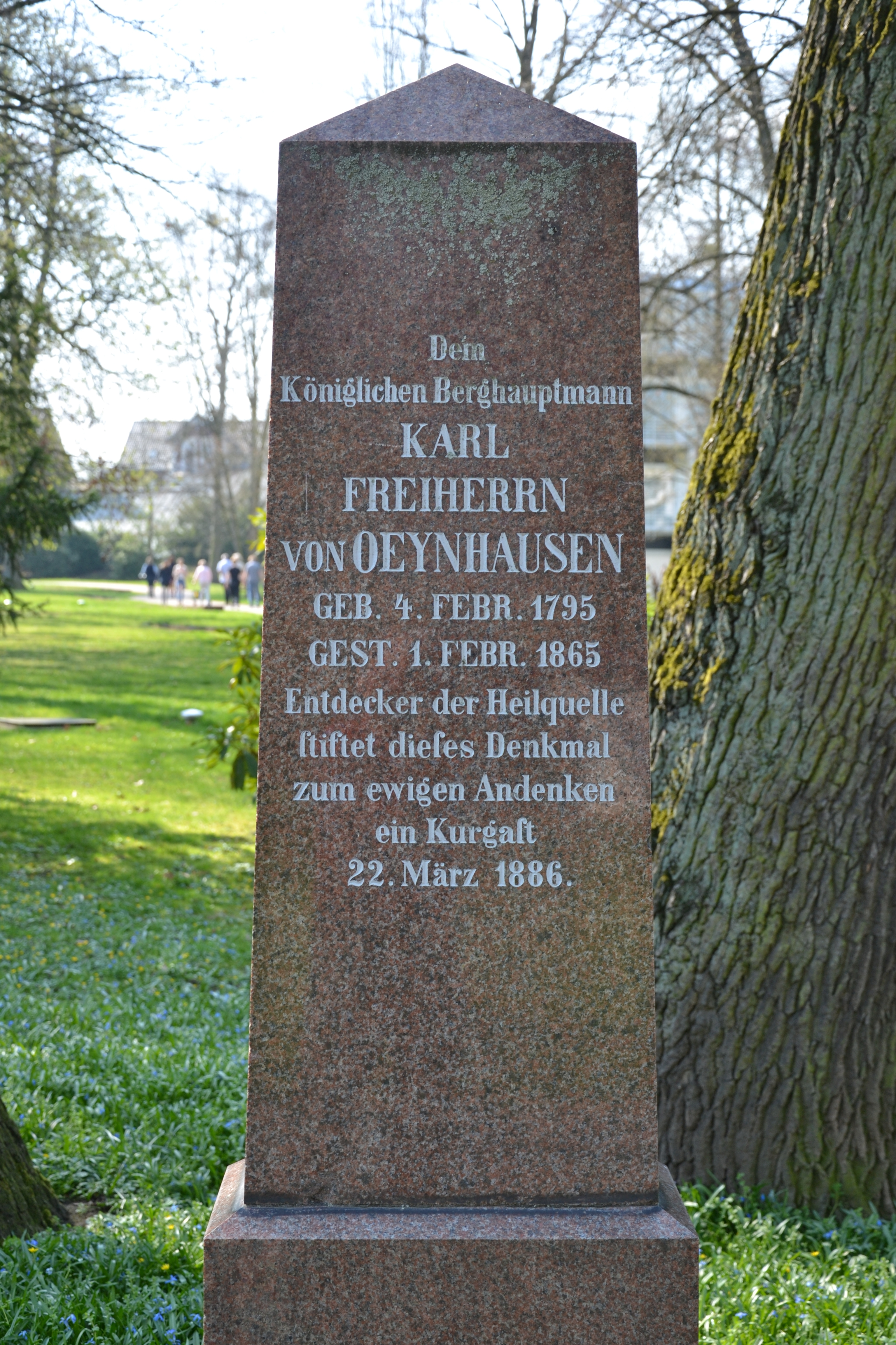 Gedenkstein Karl Friedrich von Oeynhausen im Kurpark Bad Oeynhausen